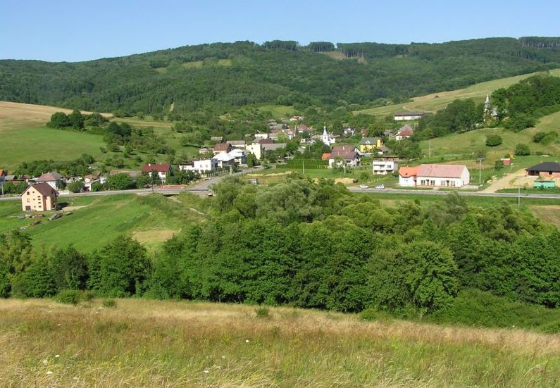 Celkový pohľad